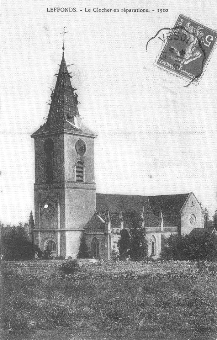 Carte postale ancienne Clocher en réparations de l'église de Leffonds, Haute-Marne, France